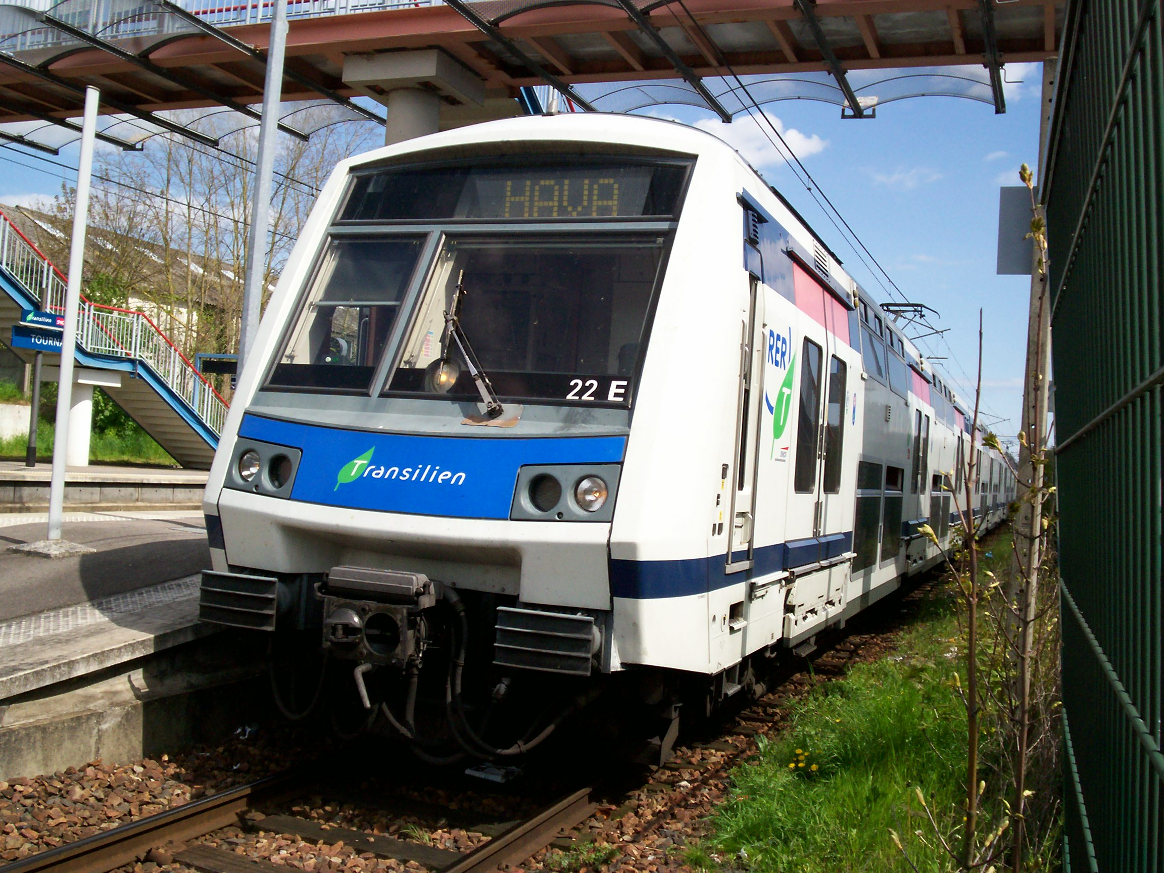 Train HAVA en gare origine de Tournan